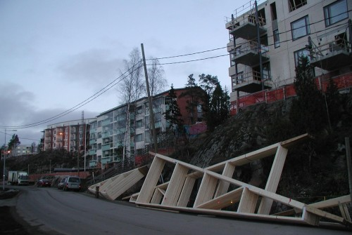 Espoon Saunalahtea rakennetaan marraskuussa 2004.